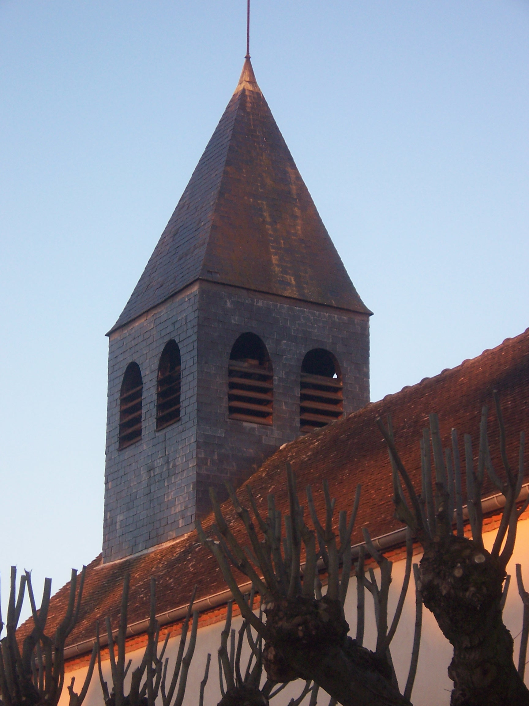 Eglise de Champforgeuil